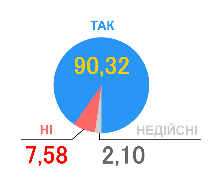 Референдум 1991: Карта. Соті відсотків опущені